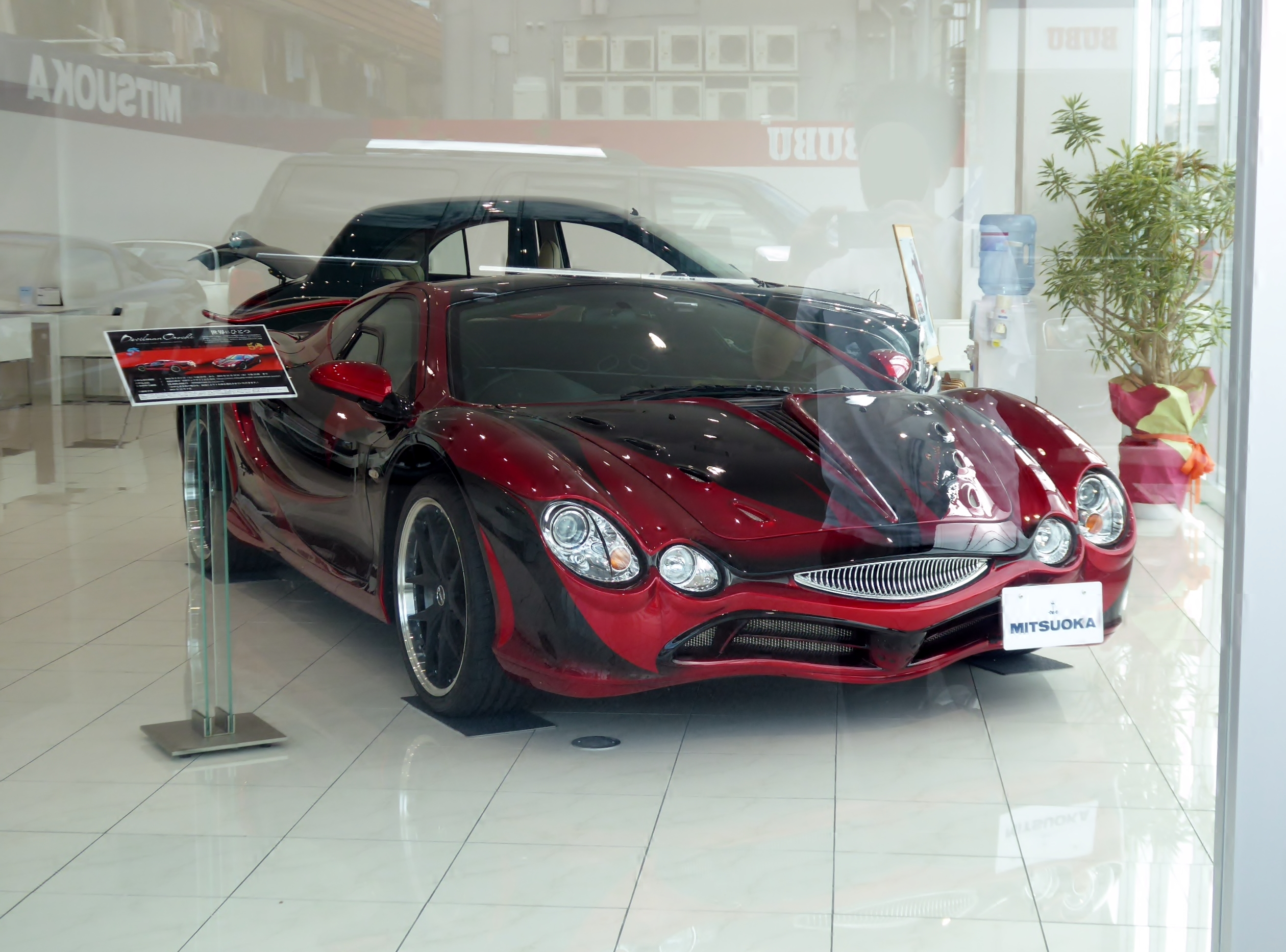 Devilman Orochiを撮影。